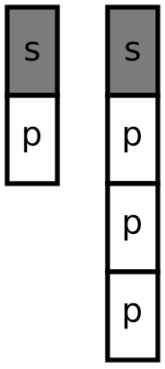 s — часть программы, которая может выполняться только одним процессом p — часть программы, которая может выполняться параллельно